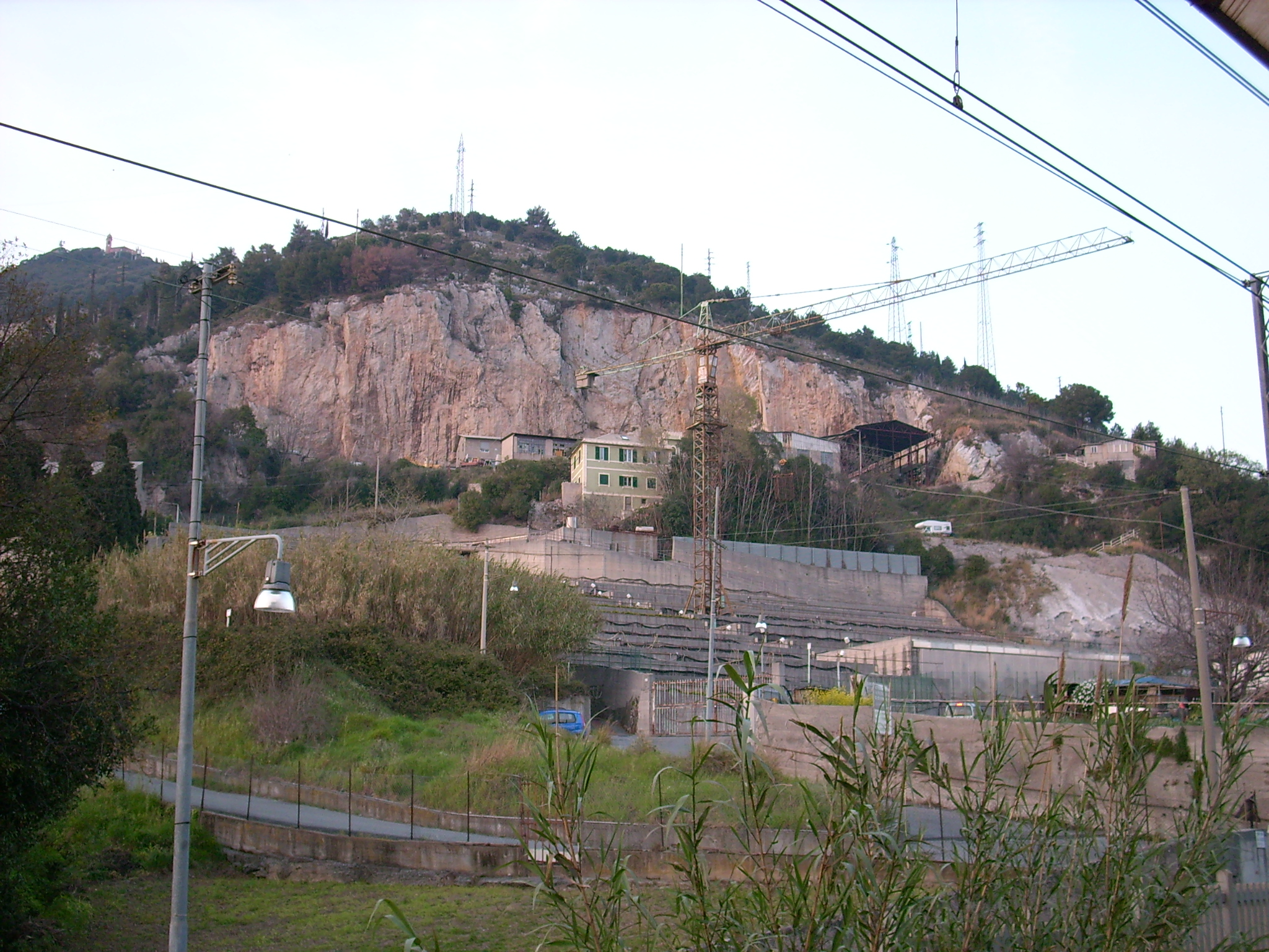 Il Monte Gazzo a Genova